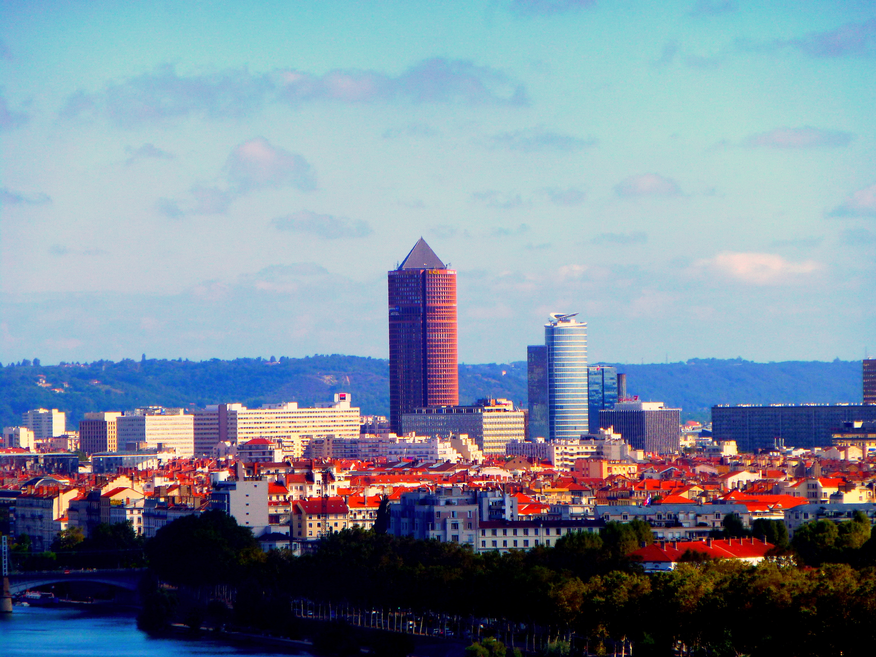 Vue de Lyon